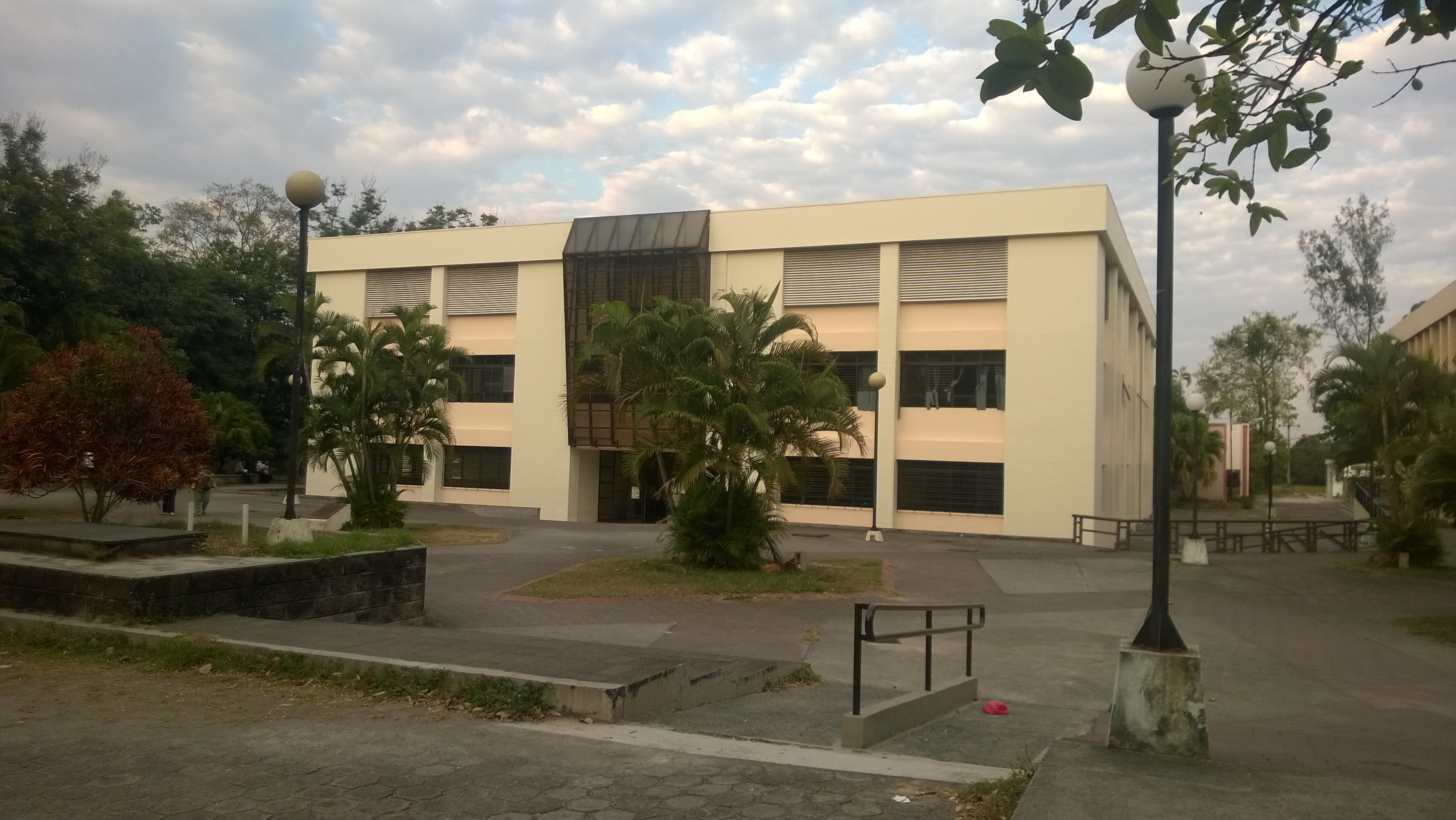 Fachada del Edificio de Ciencias de la Salud de la Universidad de El Salvador.